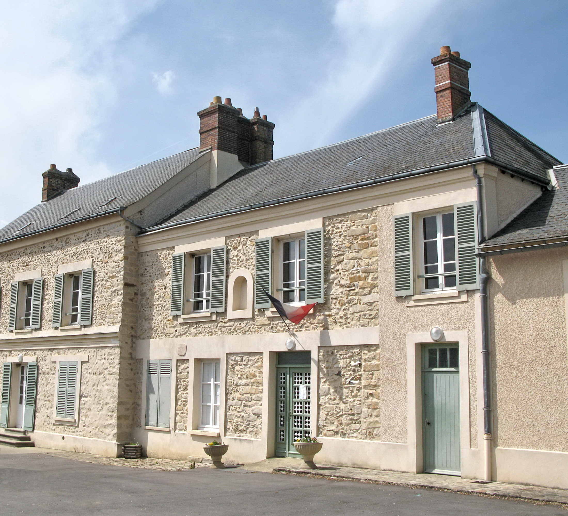 Mairie de la commune de Saint-Cyr-sous-Dourdan (Essonne)